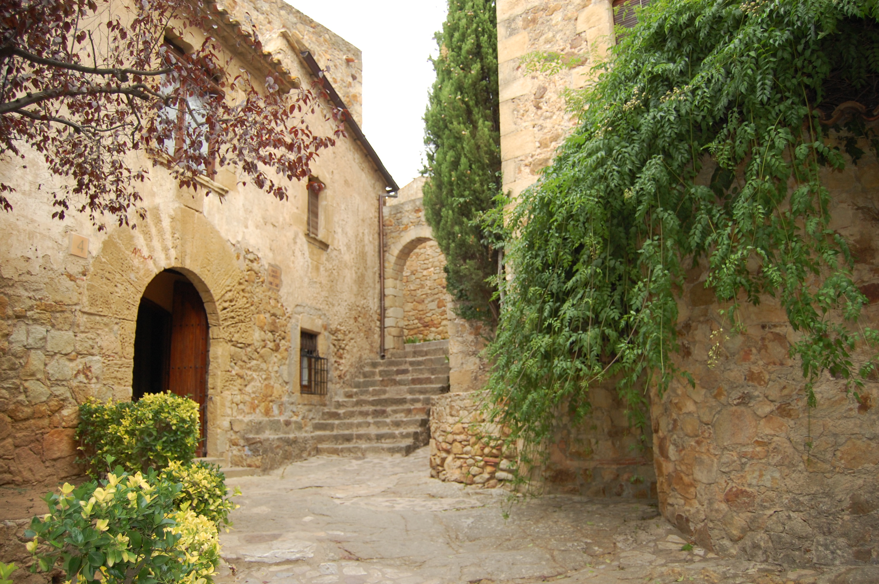 Barri del Pedró (Pals)